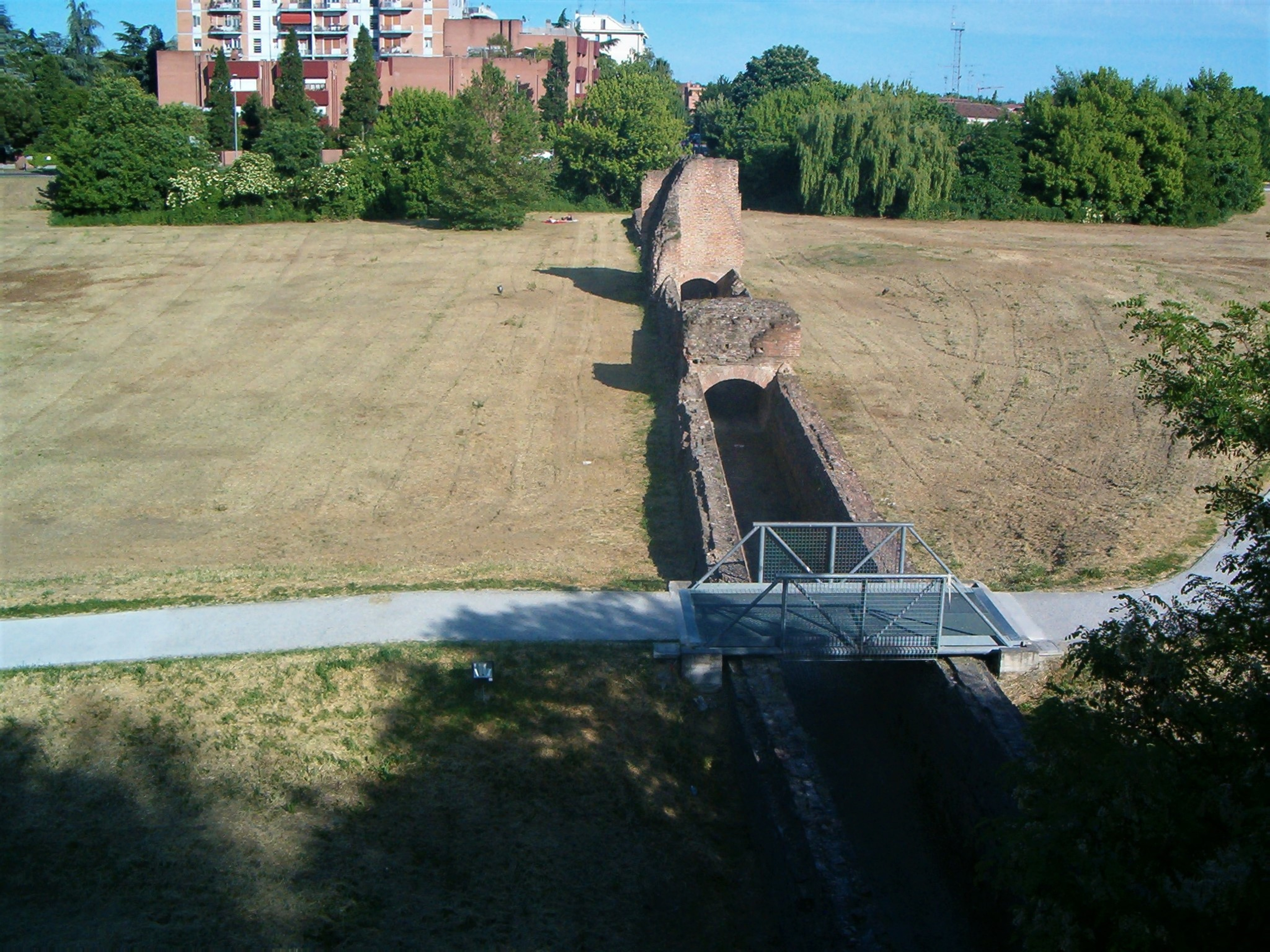 doccile